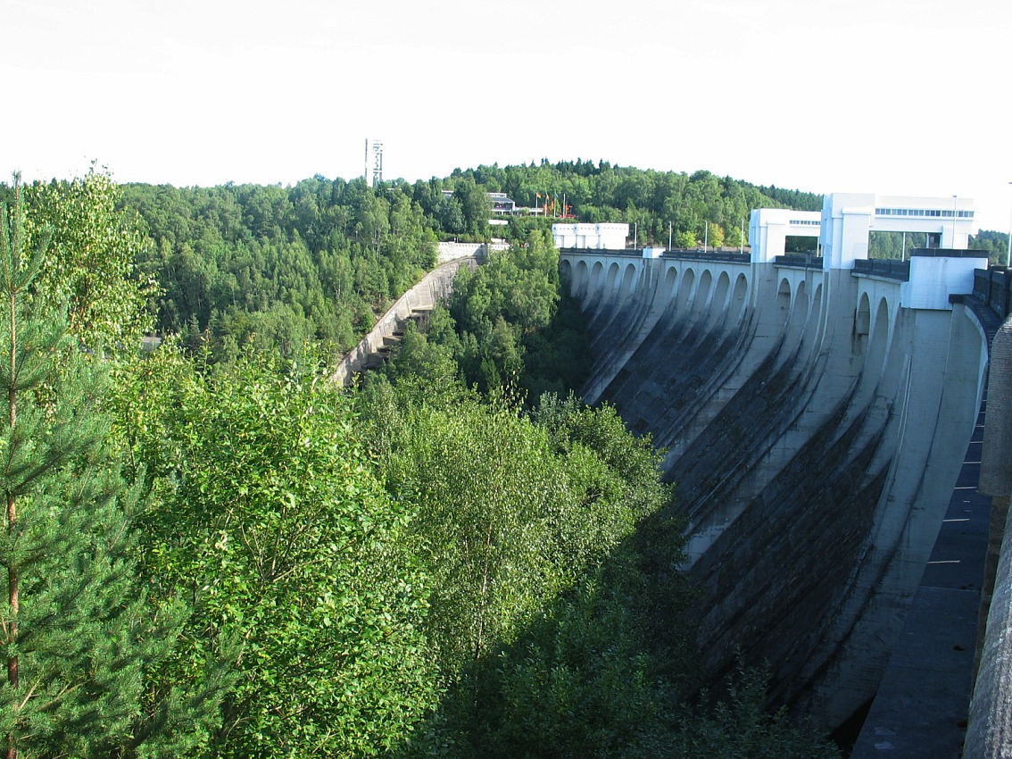 Staudamm der Wesertalsperre bei Eupen